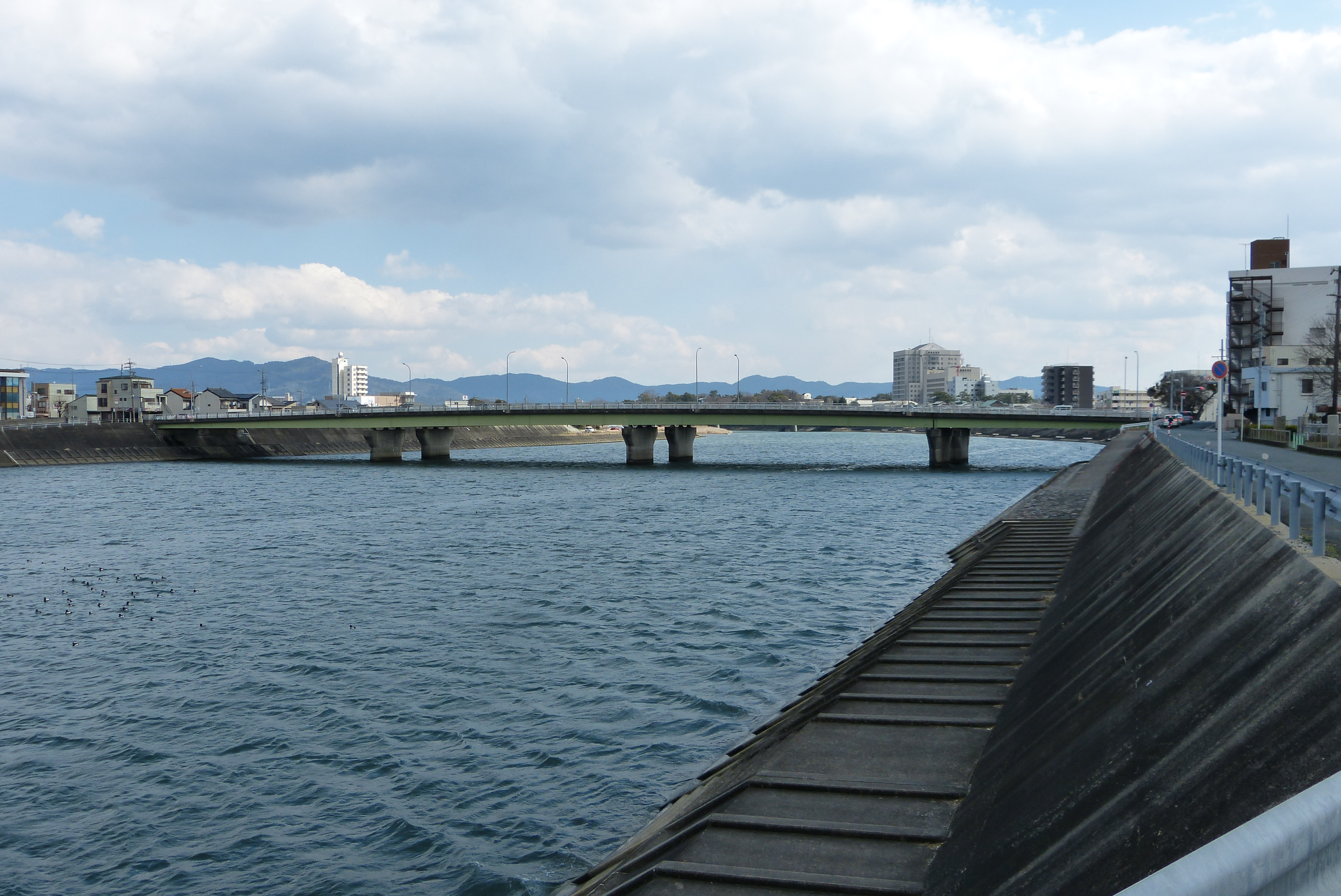 豊川に架かる橋梁としての豊橋。愛知県豊橋市。